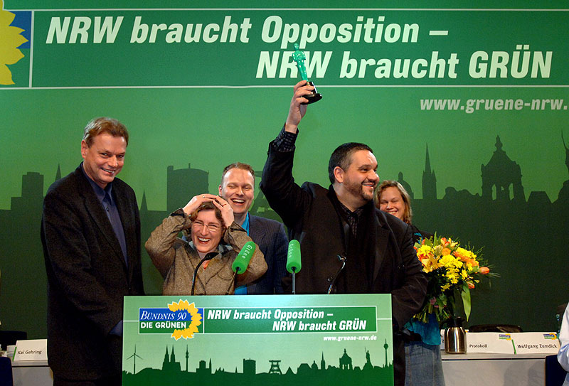 Oliver Keymis übergibt den Grünen Oskar